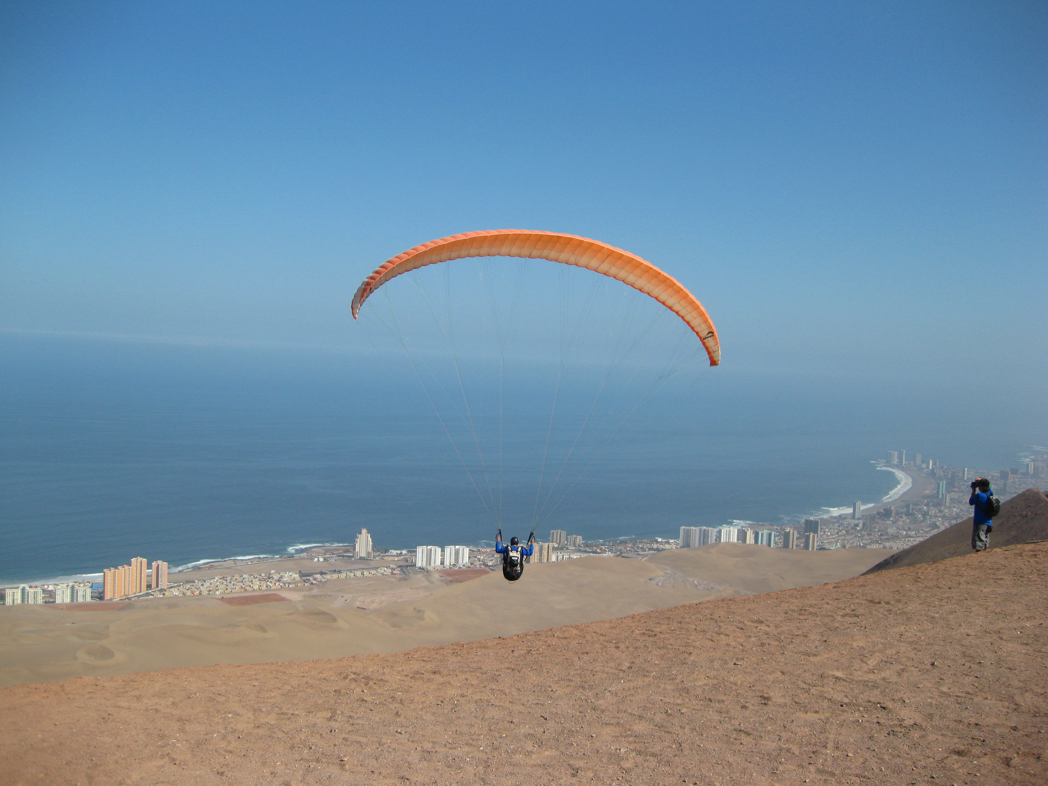 Paragliding in Iquique, Chile